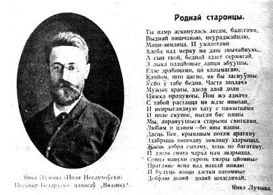 Беларуская (тарашкевіца): Паштоўка, прысьвечаная Янку Лучыне